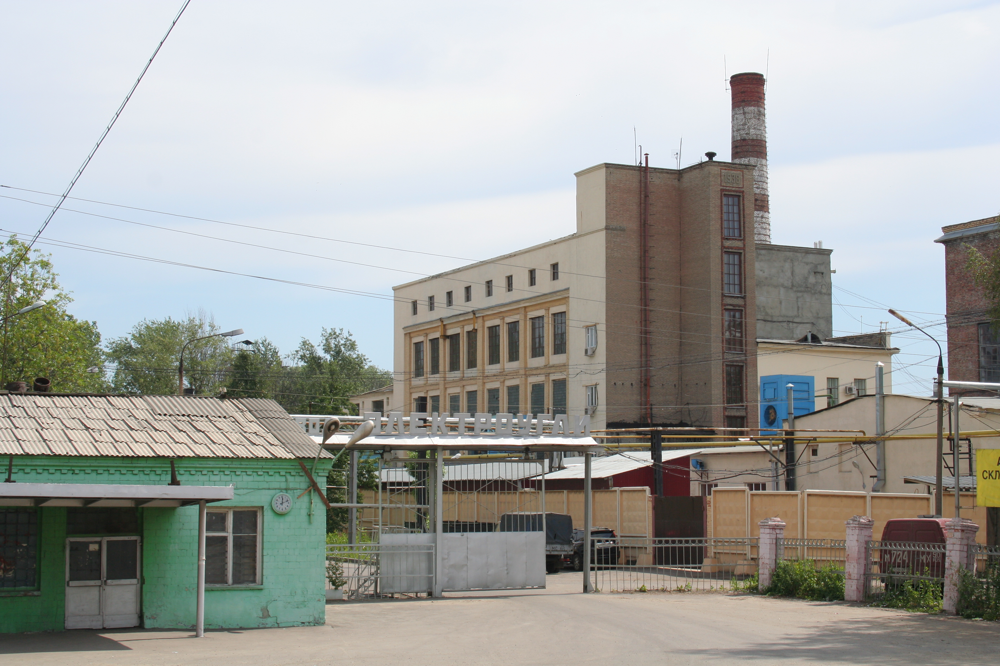 Elektrokohle-Fabrik in Elektrougli, Oblast Moskau, Russland.